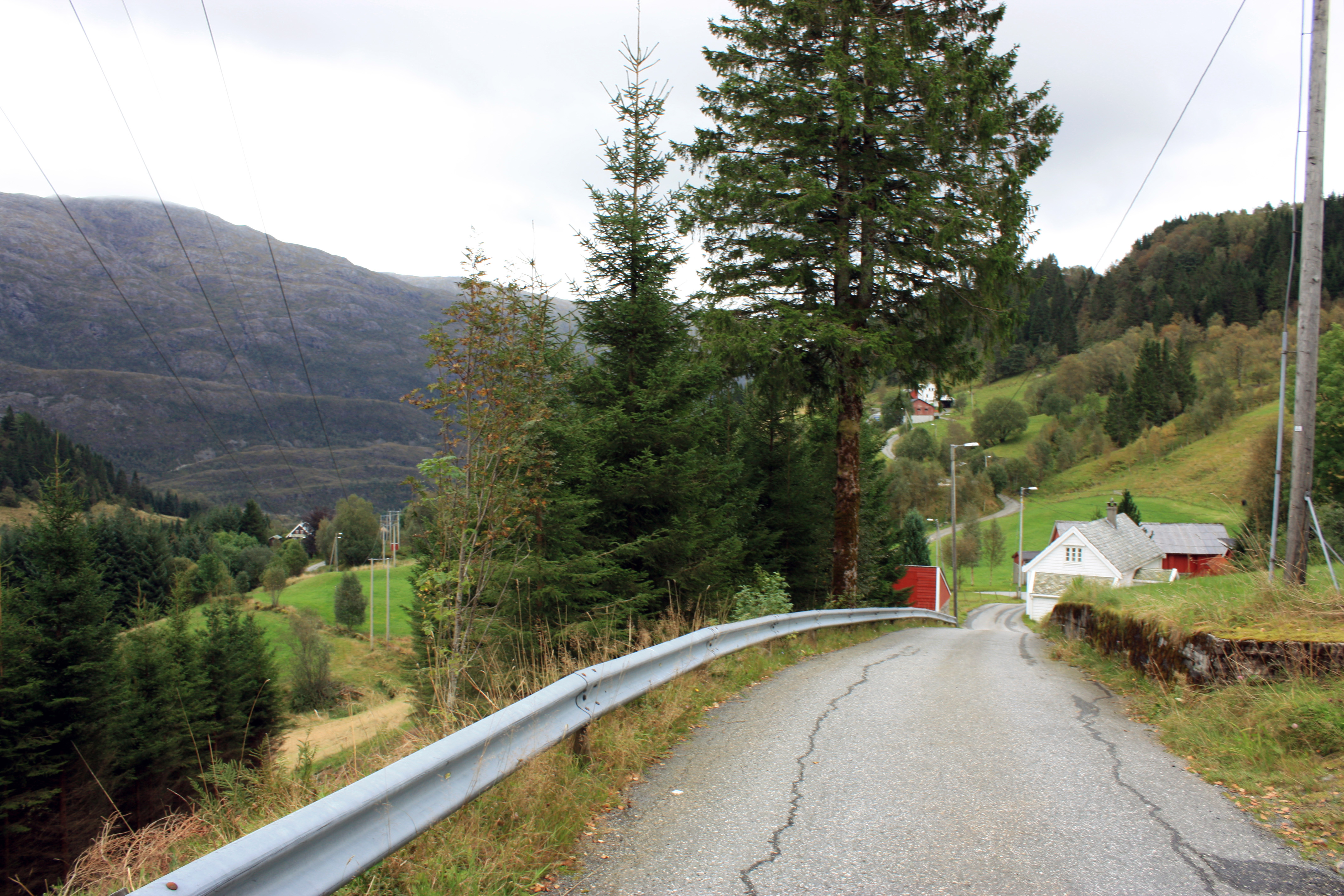 Lundagotnene, Fana, Bergen.